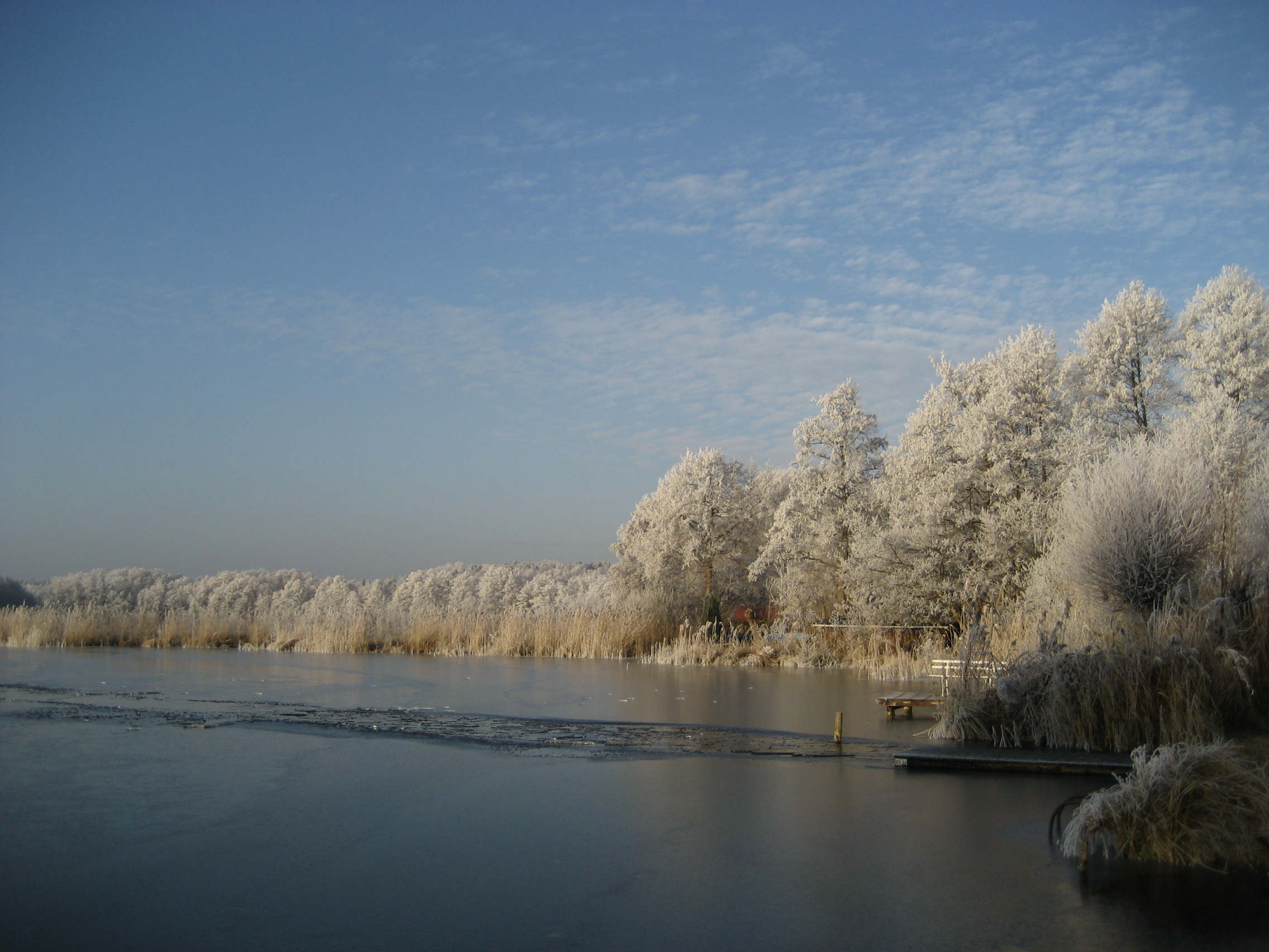 Nesselpfuhl im Winter